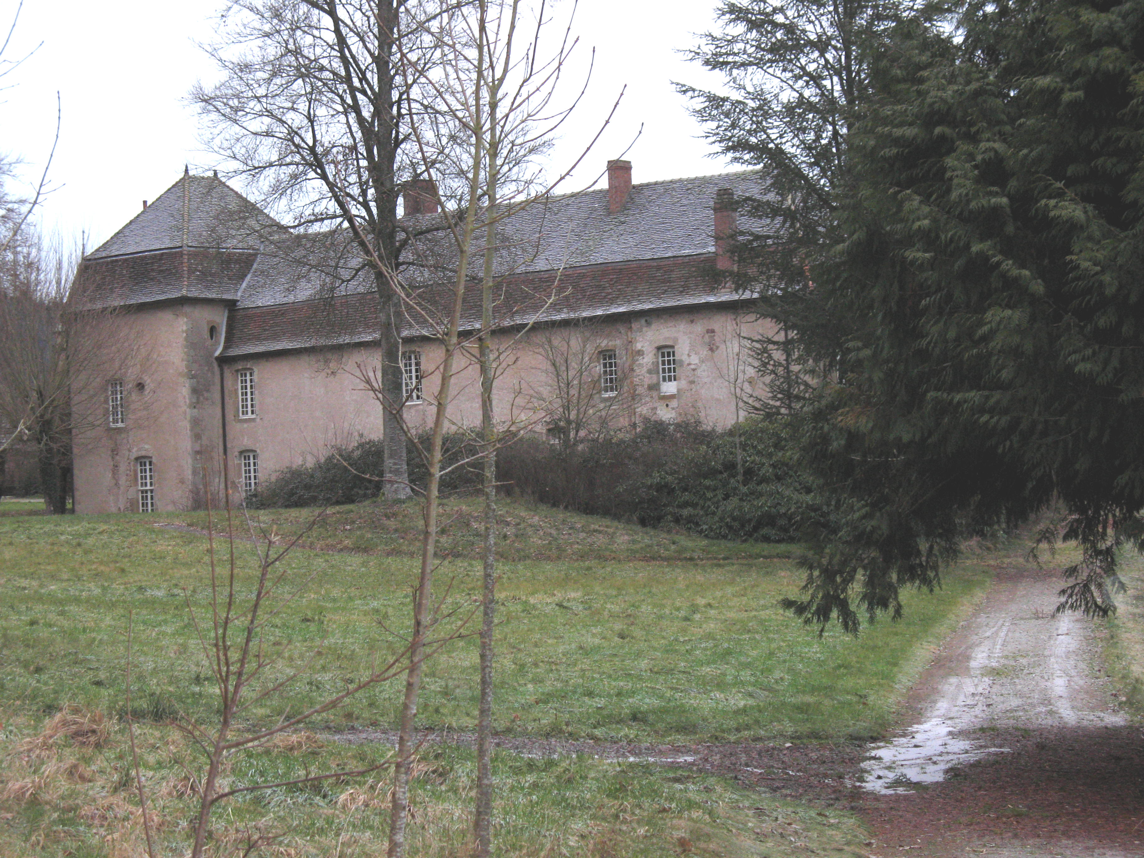 Les communs du château de Visigneux à Lucenay-l'Evêque (Saône-et-Loire)